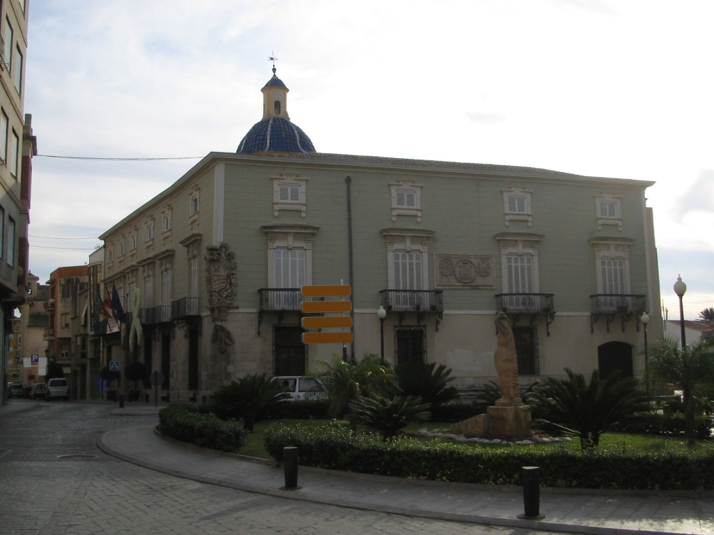 Ajuntament d'Oriola, Comunitat Valenciana, Espanya.